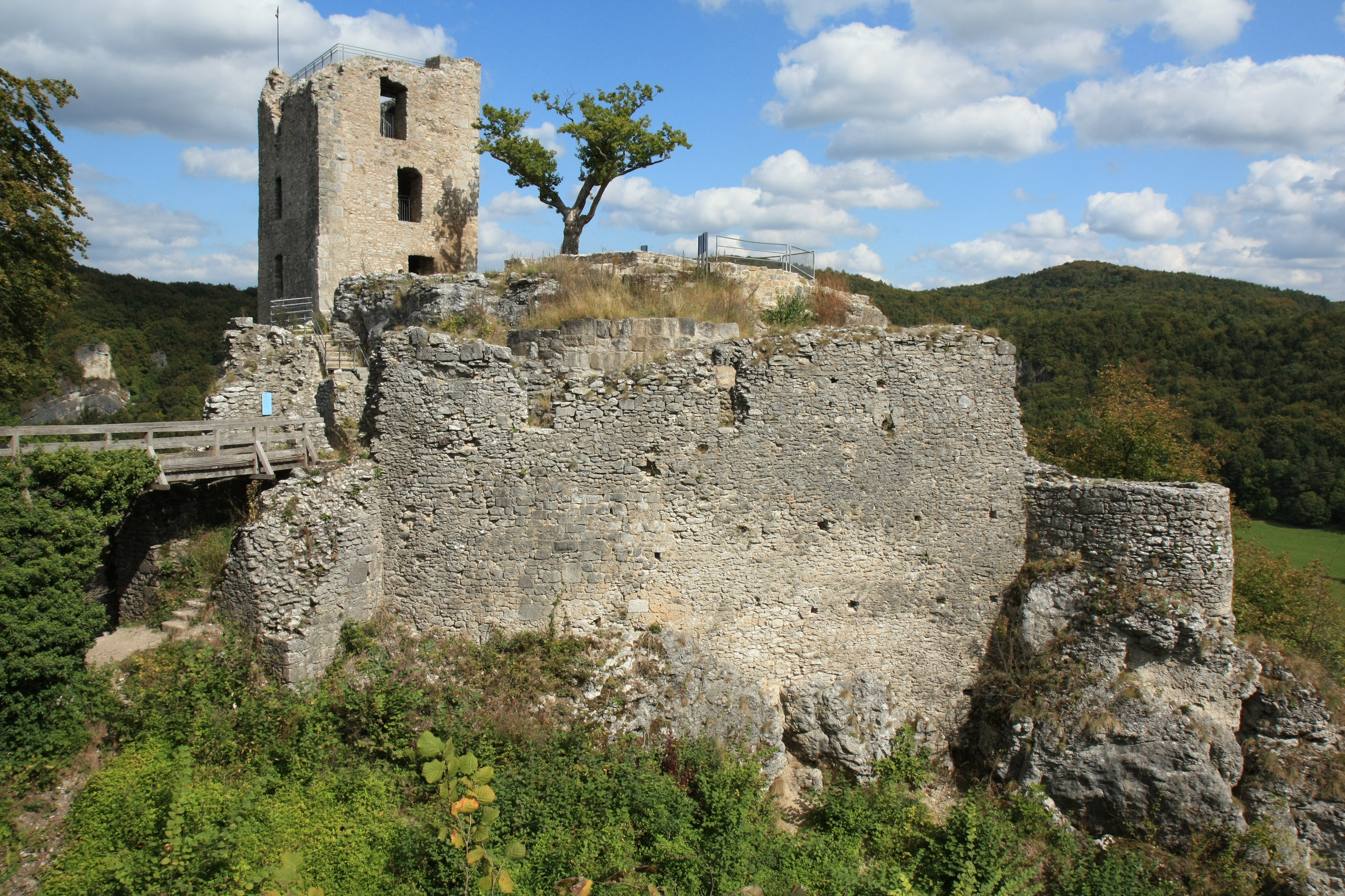 Ansicht der Hauptburg mit dem Halsgraben im Vordergrund